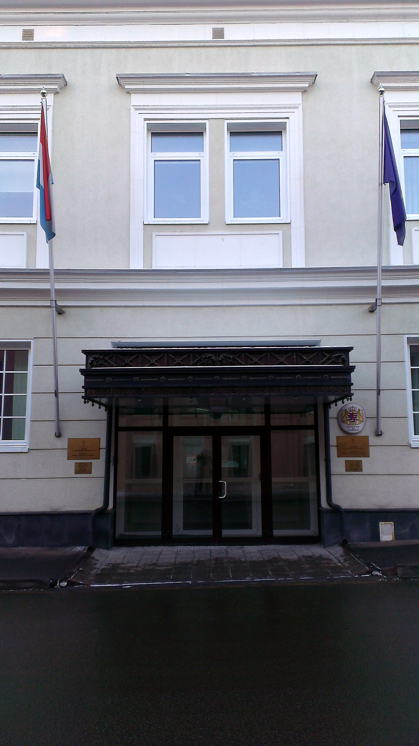 D'renovéiert Fass vun der lëtzebuergescher Ambassade zu Moskau.